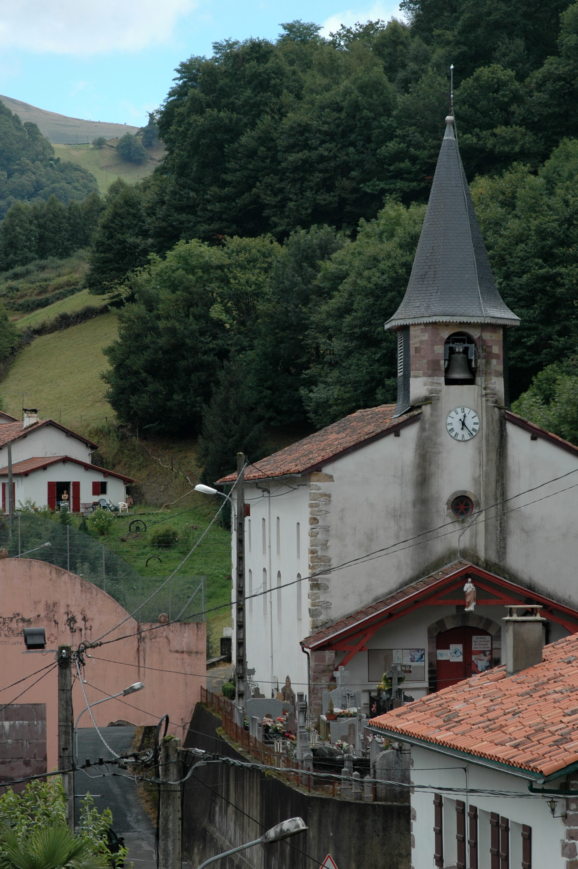 Banca - Église paroissiale